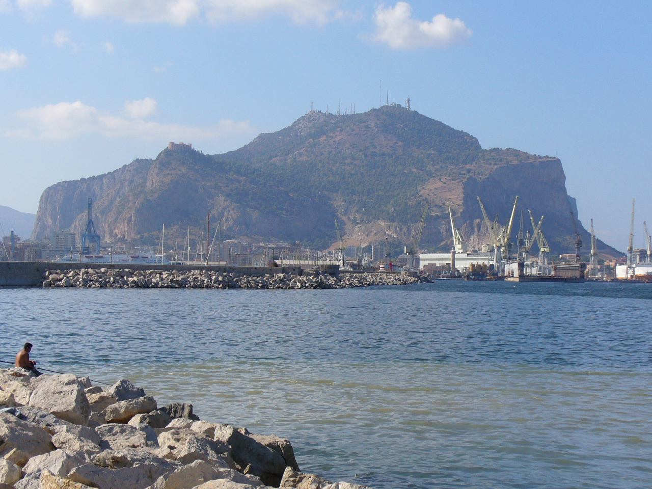 Tem um castelo na montanha.